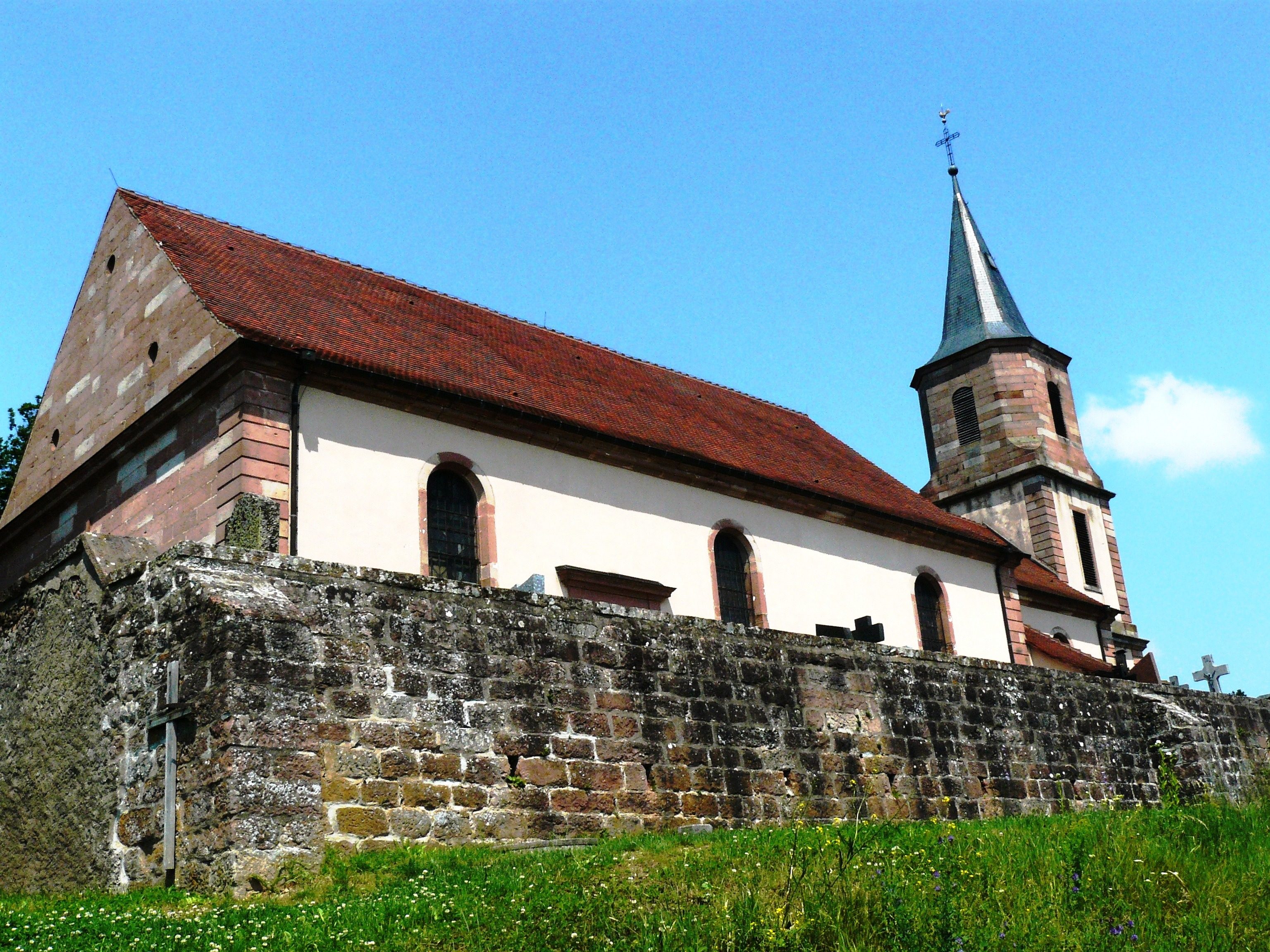 Eglise Saint-Gille de Howart